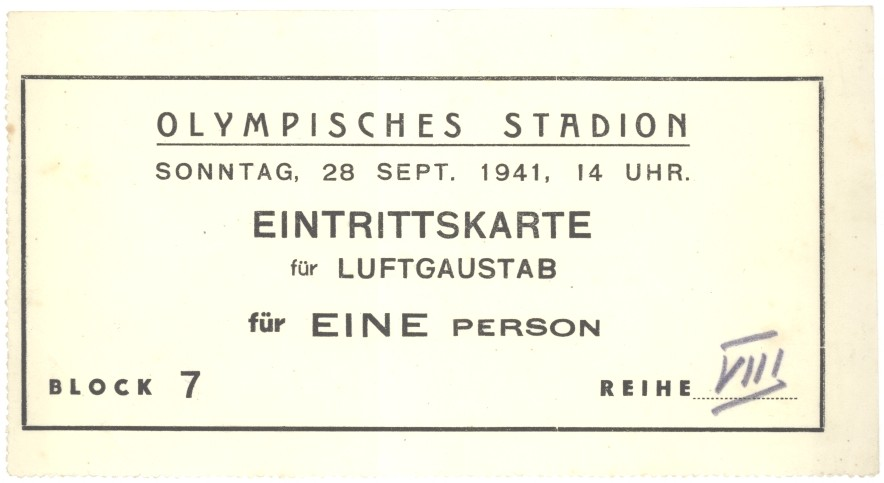 Eintrittskarte in das Olympische Stadion für Sonntag 28.September 1941, 14 Uhr Nur wo ist nicht klar ...